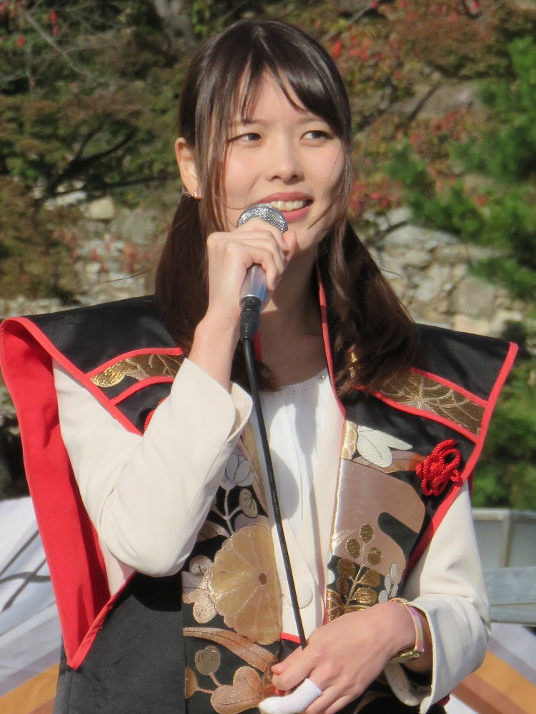 将棋棋士の里見咲紀（平成２９年１１月、姫路市で行われた人間将棋にて）